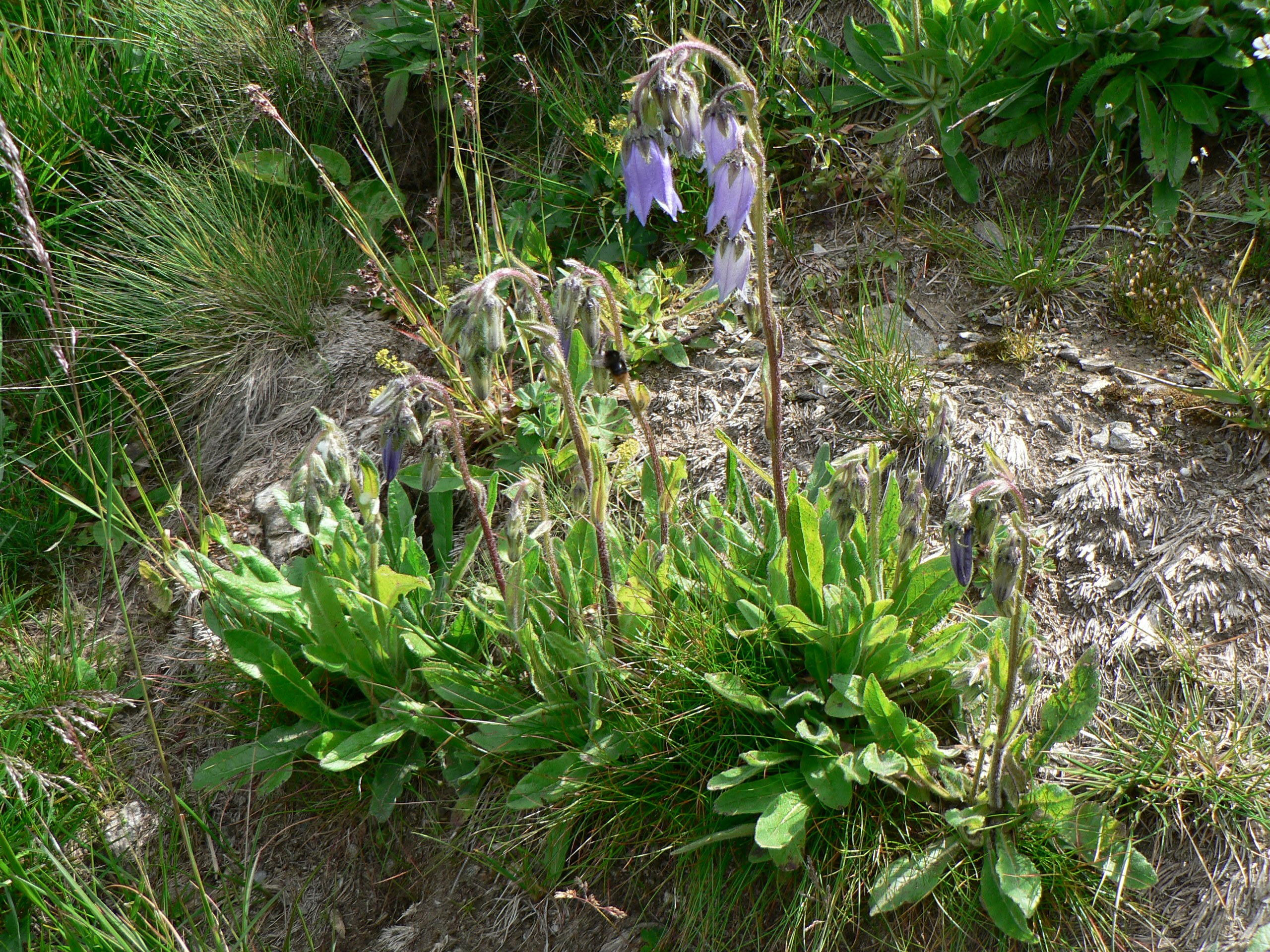 Zvonek vousatý, Červená hora, Hrubý Jeseník